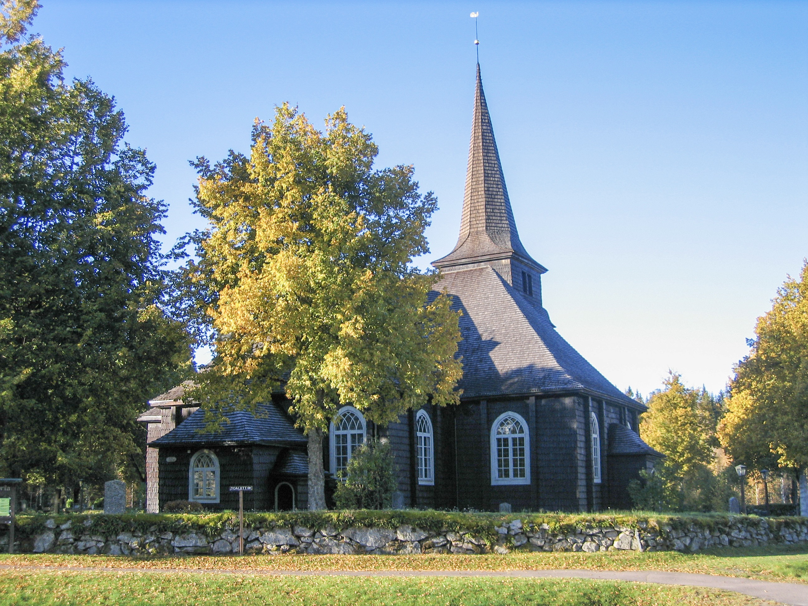 Östmarks kyrka